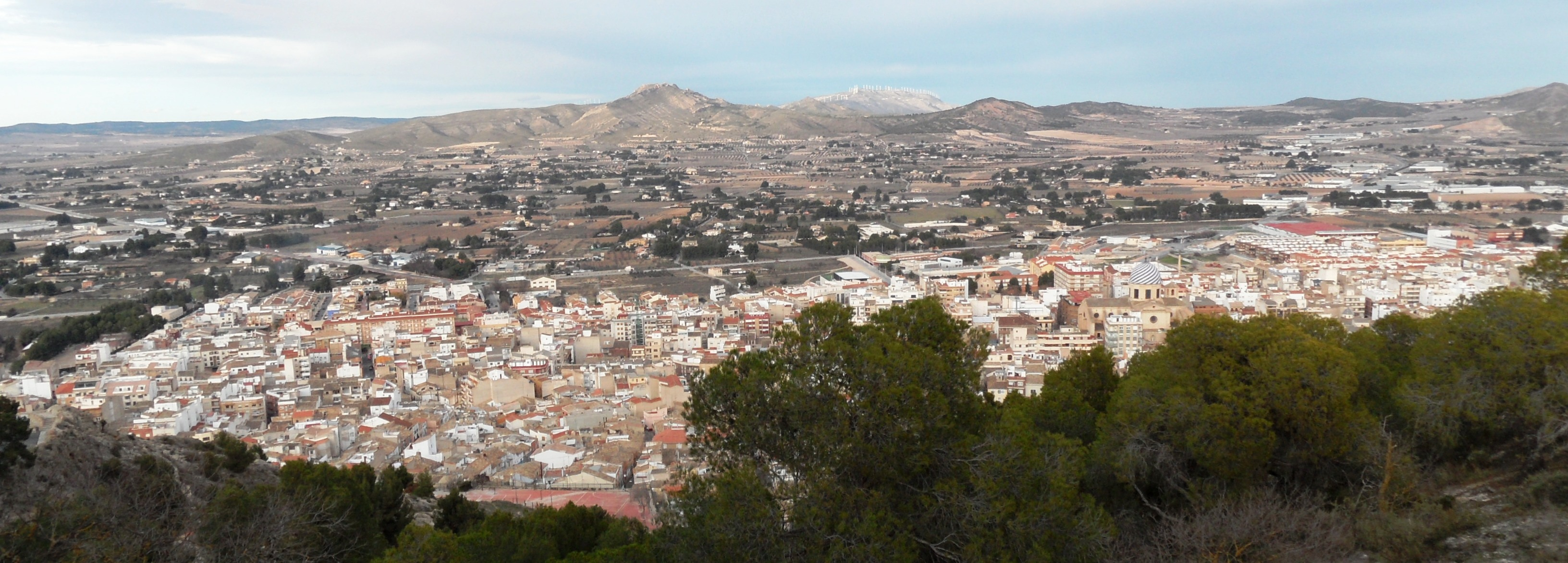 Vista desde el Paso de la Bandera.